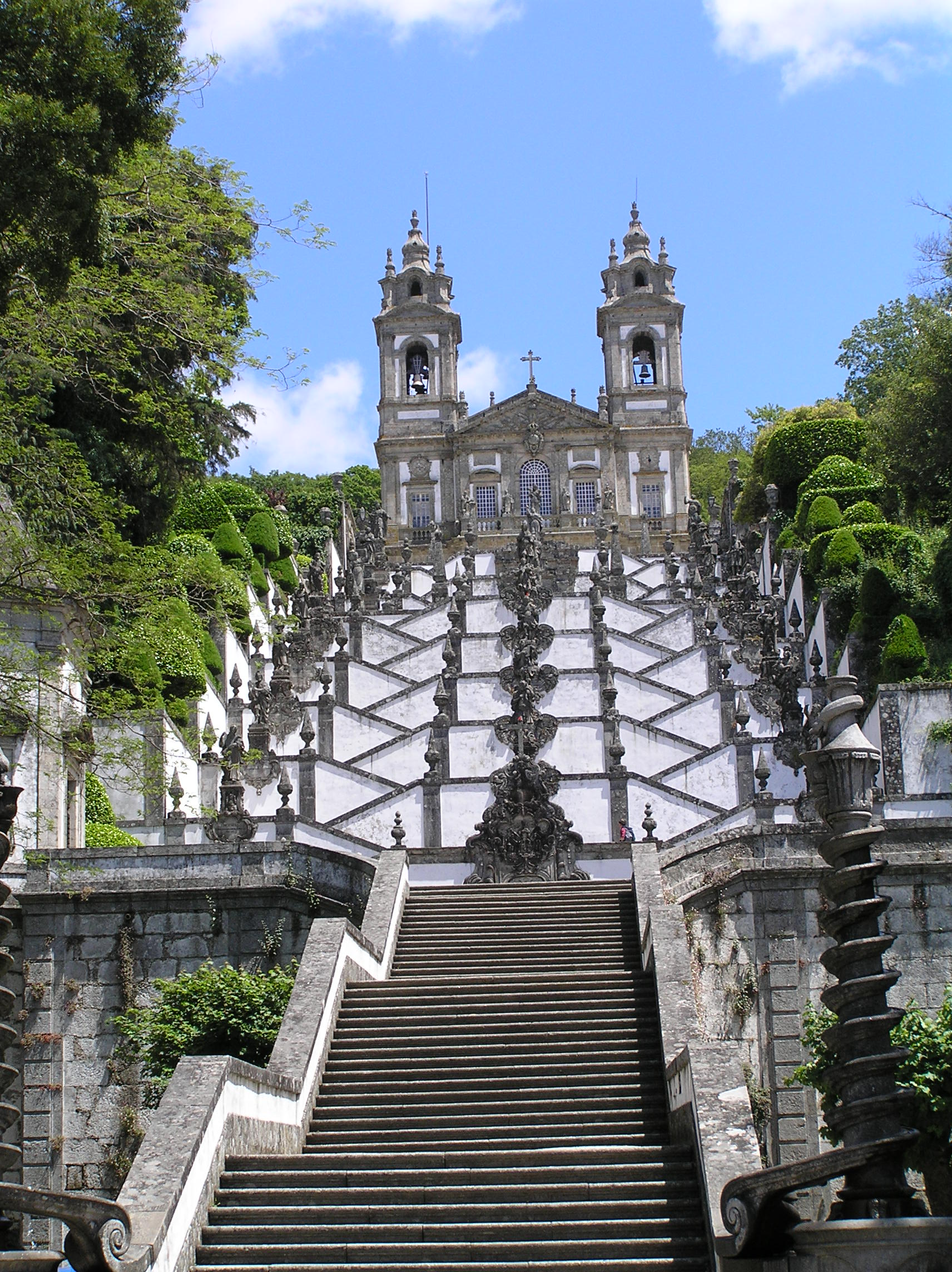 Doppelläufige Treppenanlage zur Wallfahrtskirche Bom Jesus do Monte etwa 5 km von Braga, Portugal, entfernt